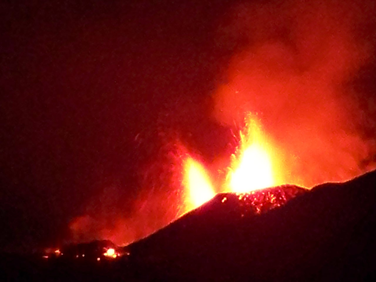 Ausbruchsstelle am Fimmvörðuháls von Fljótshlíð aus gesehen (Þórsmörk). 25.03.2010